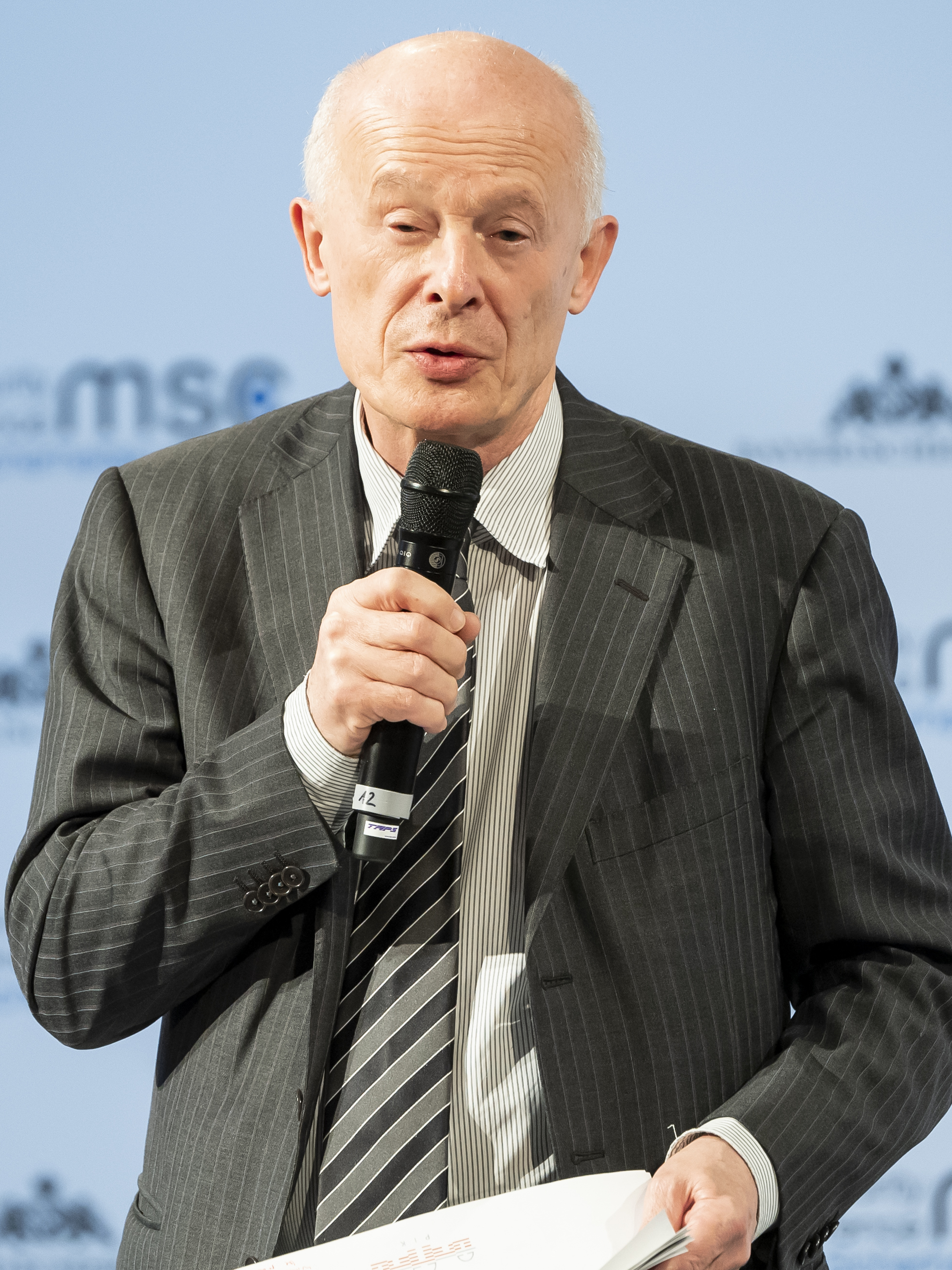 Hans Joachim Schellnhuber während der Münchener Sicherheitskonferenz 2019